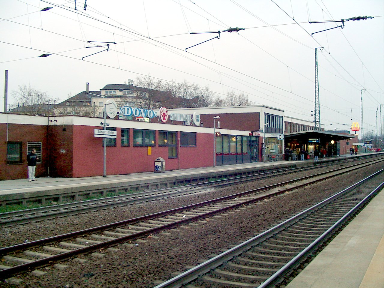 Solingen Hauptbahnhof (zum Aufnahmezeitpunkt noch Bf. SG-Ohligs)